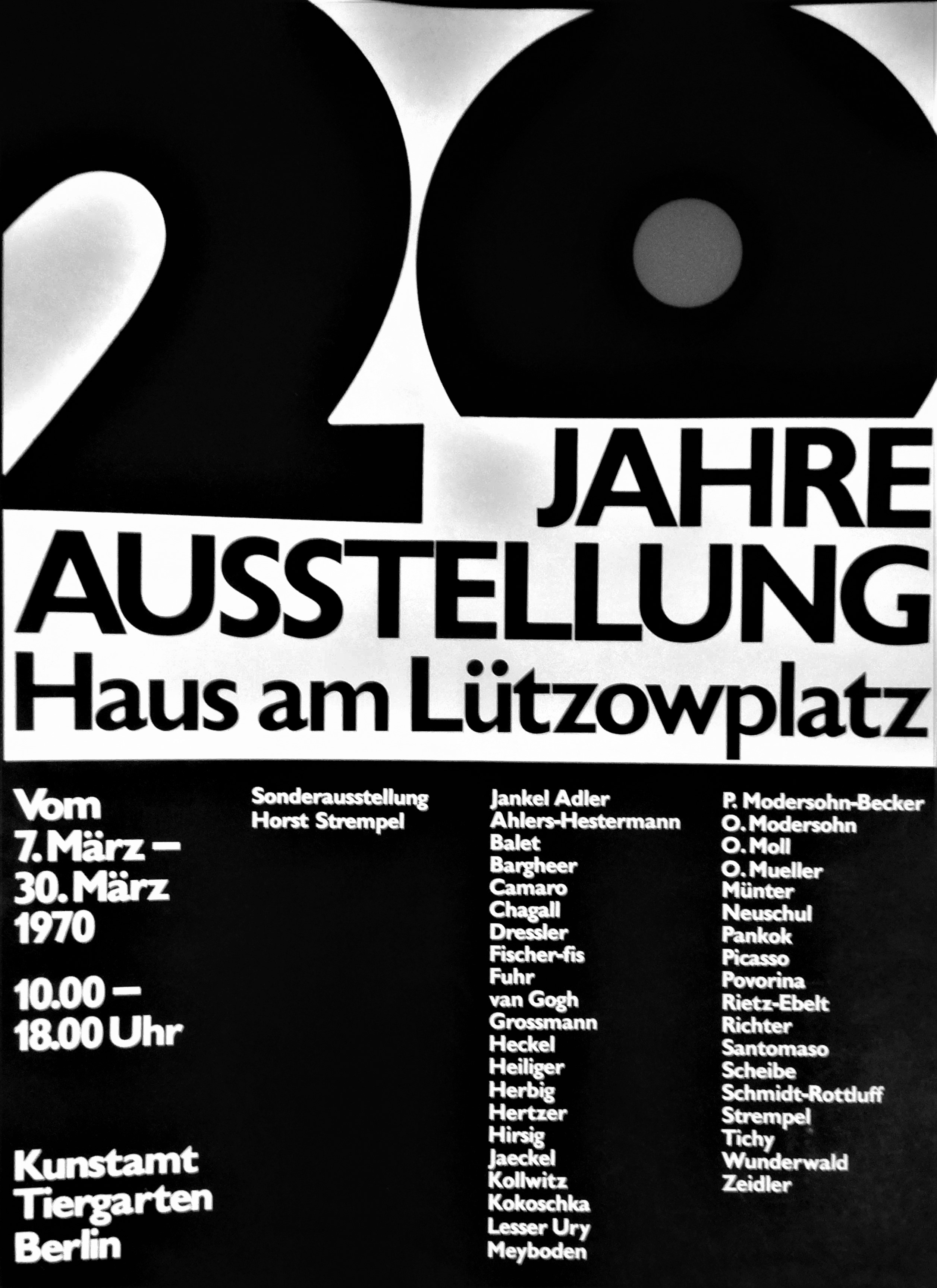 Plakat Kunstausstellung 1970 Haus am Lützowplatz